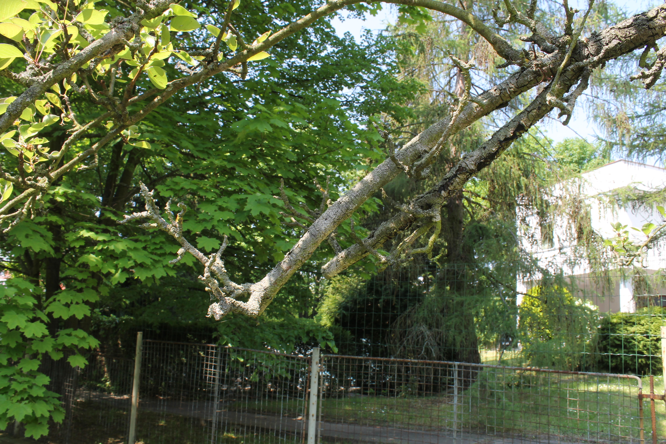 Hrušeň, zavětvení , Brno Komín